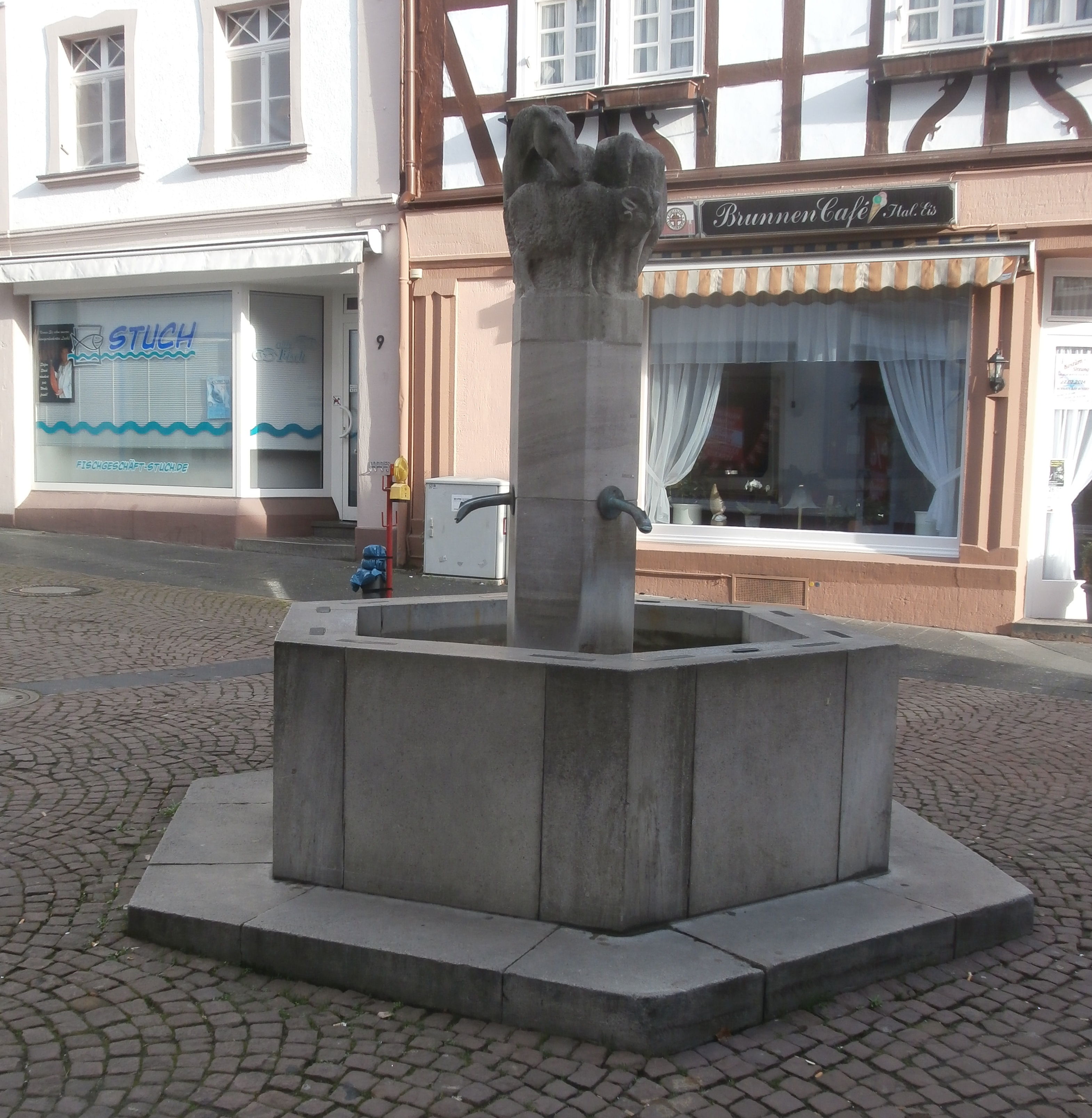 Tierbrunnen (1978) von Ernemann Sander, Ecke Hauptstraße/Kirchplatz, Bad Honnef